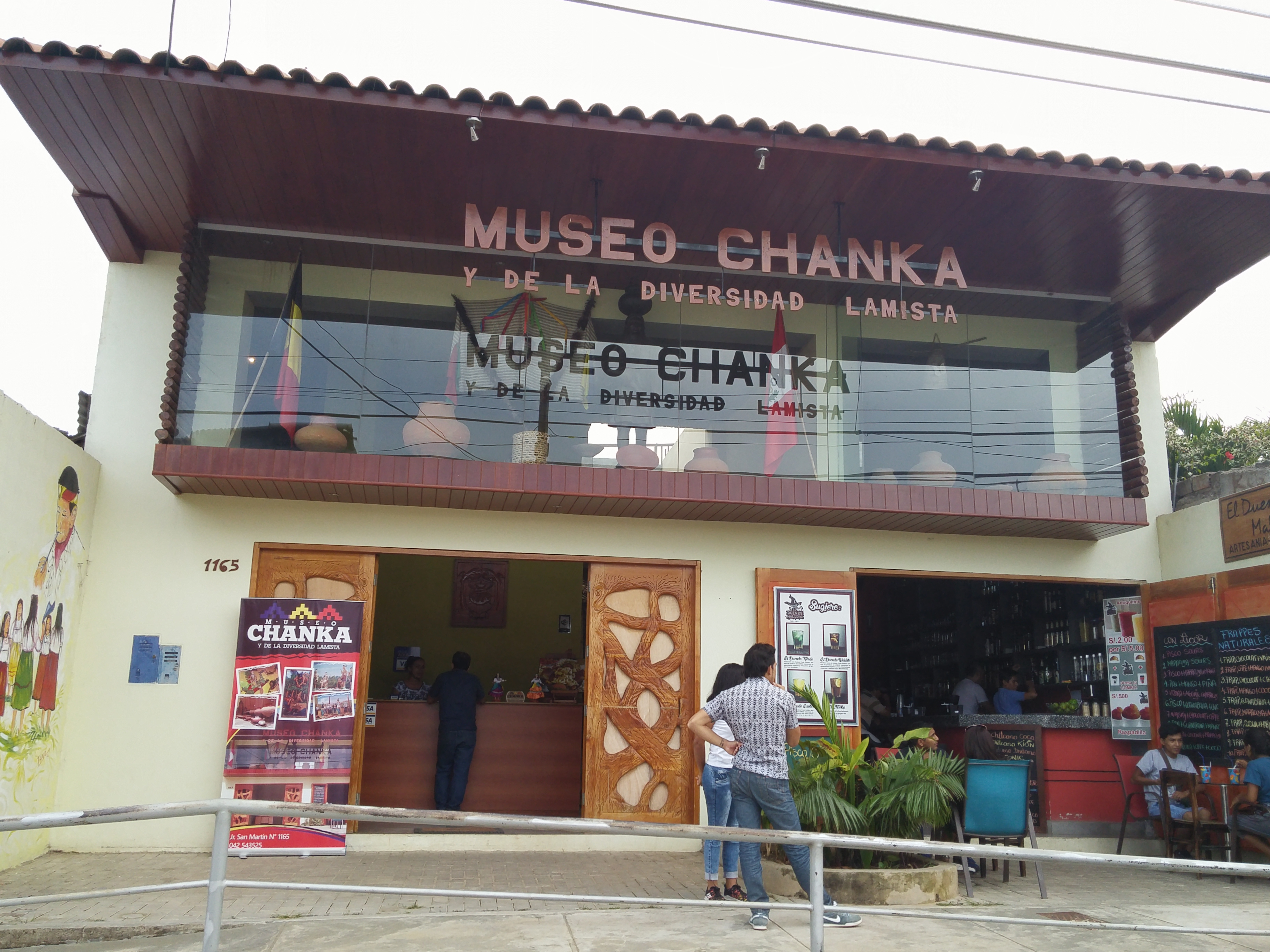 Preservar las costumbres de la ciudad de Lamas